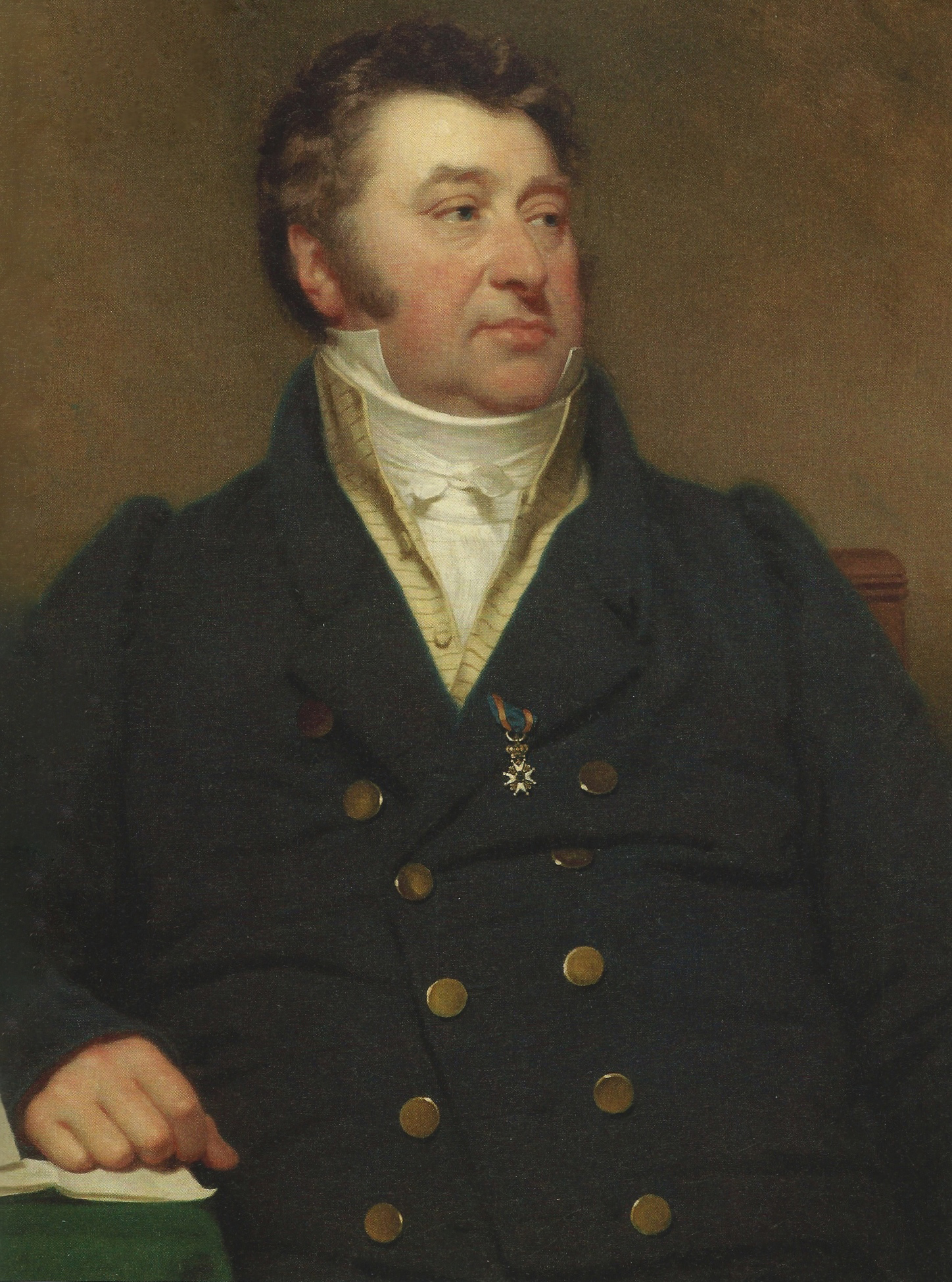 Portret van de Leidse burgemeester Gerardus Andreas Martinus van Bommel (1770-1832)